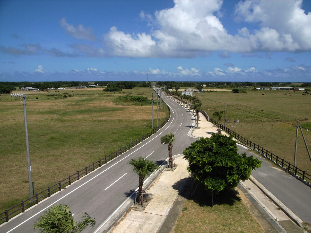 Okinawa Pref. Road No.213, Kuroshima Island, Okinawa Pref., Japan / 沖縄県道213号（沖縄県黒島）